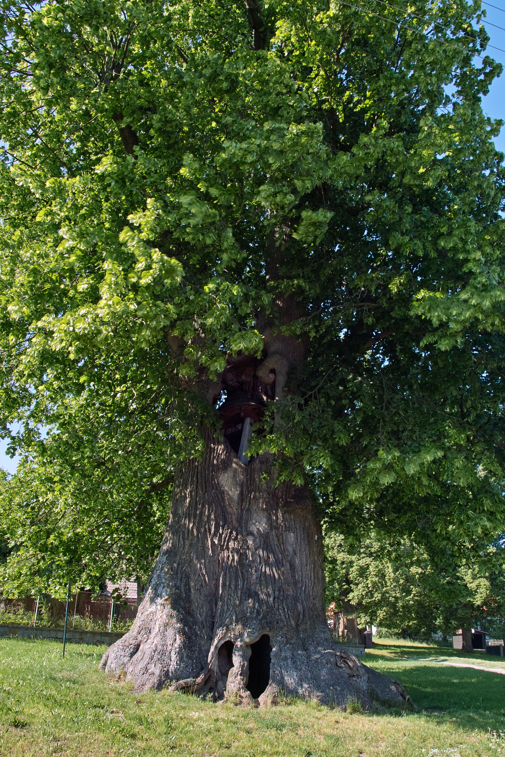 Praskoleská lípa, 500-800 let stará památná lípa